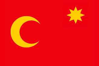 Bandera de Djebel Shammar Imagen realizada por J. Ollé Véase también: Wikipedia:Autorizaciones/Banderas de Jaume Ollé Categoría:Banderas (imagen)